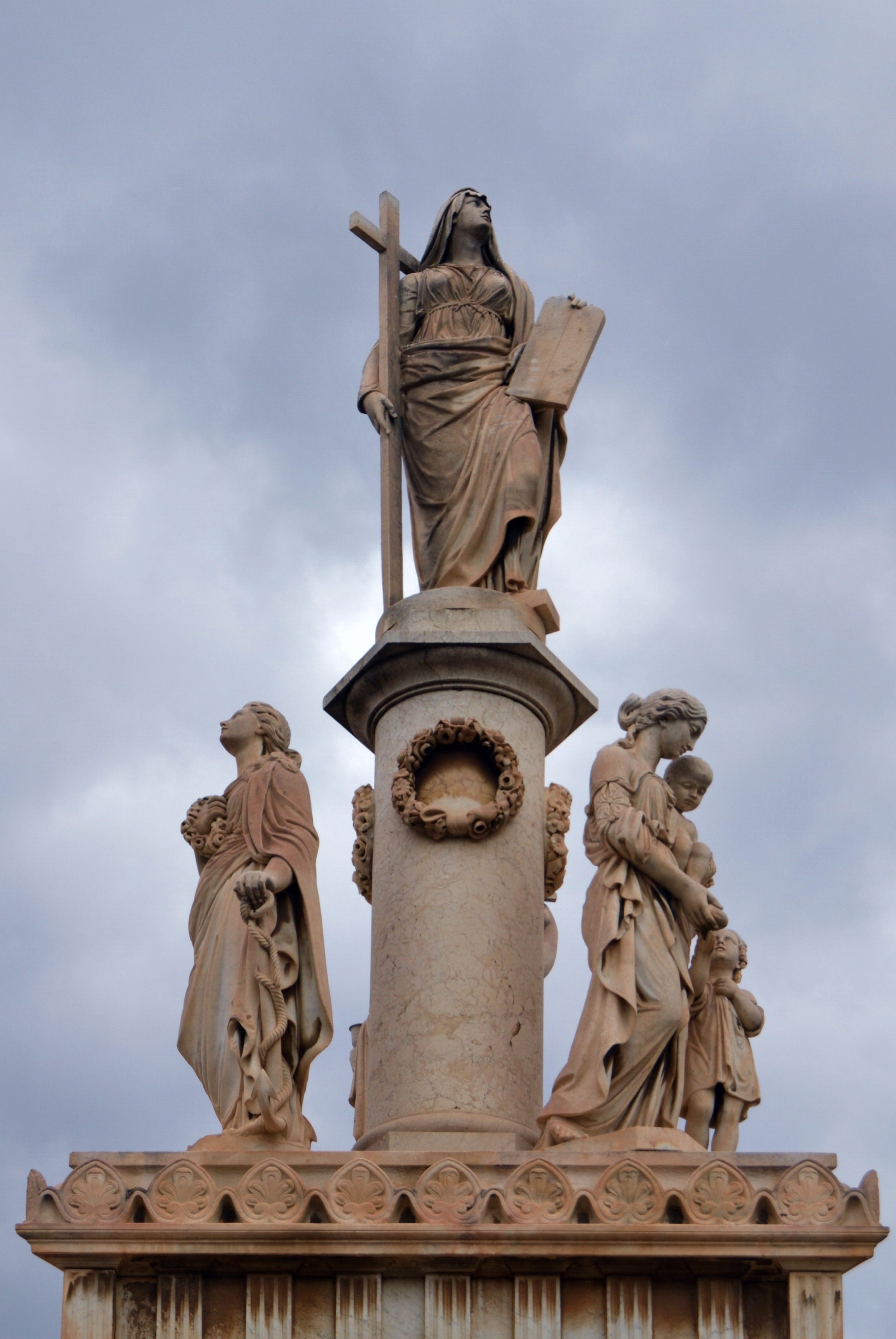 Cementeri General de València, estàtues i columna d'un panteó.